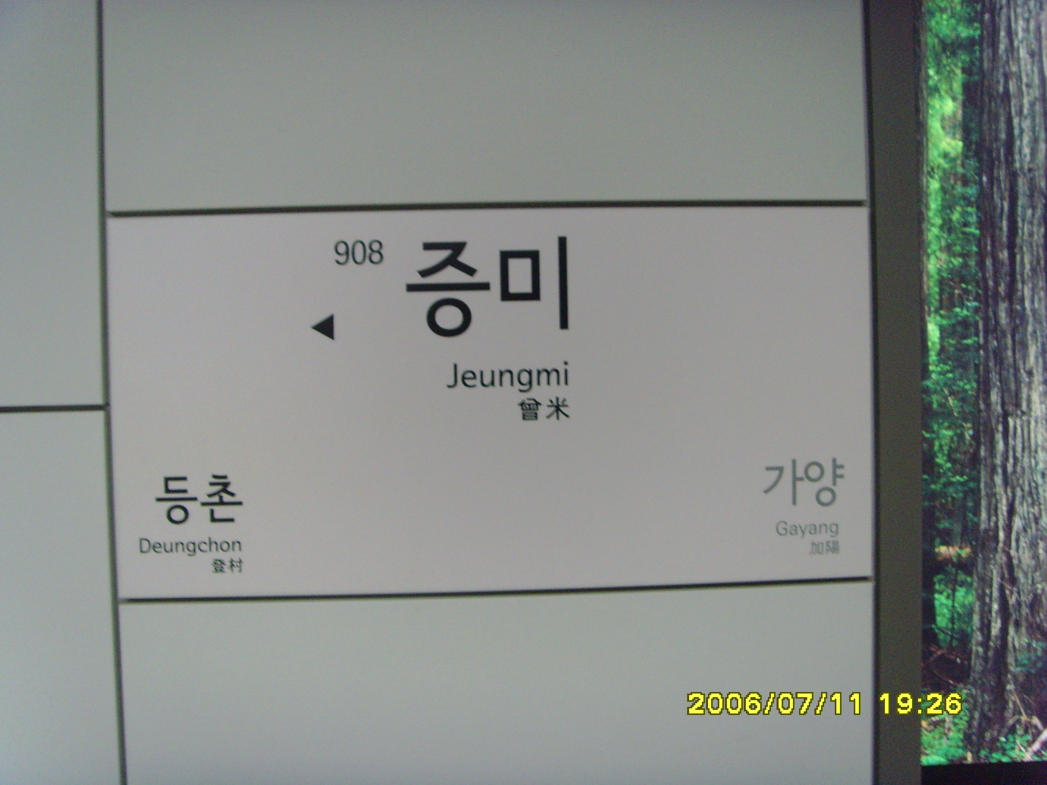 ソウル地下鉄9号線曾米駅 駅名標